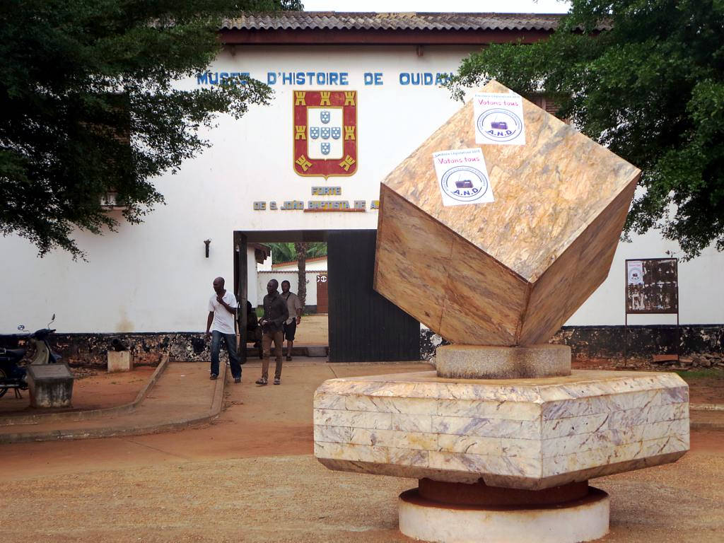 The Musee d'Histoire de Ouidah occupies the Portuguese Forte de Sao Joao Baptista de Ajuda (1721) in Ouidah, Benin.